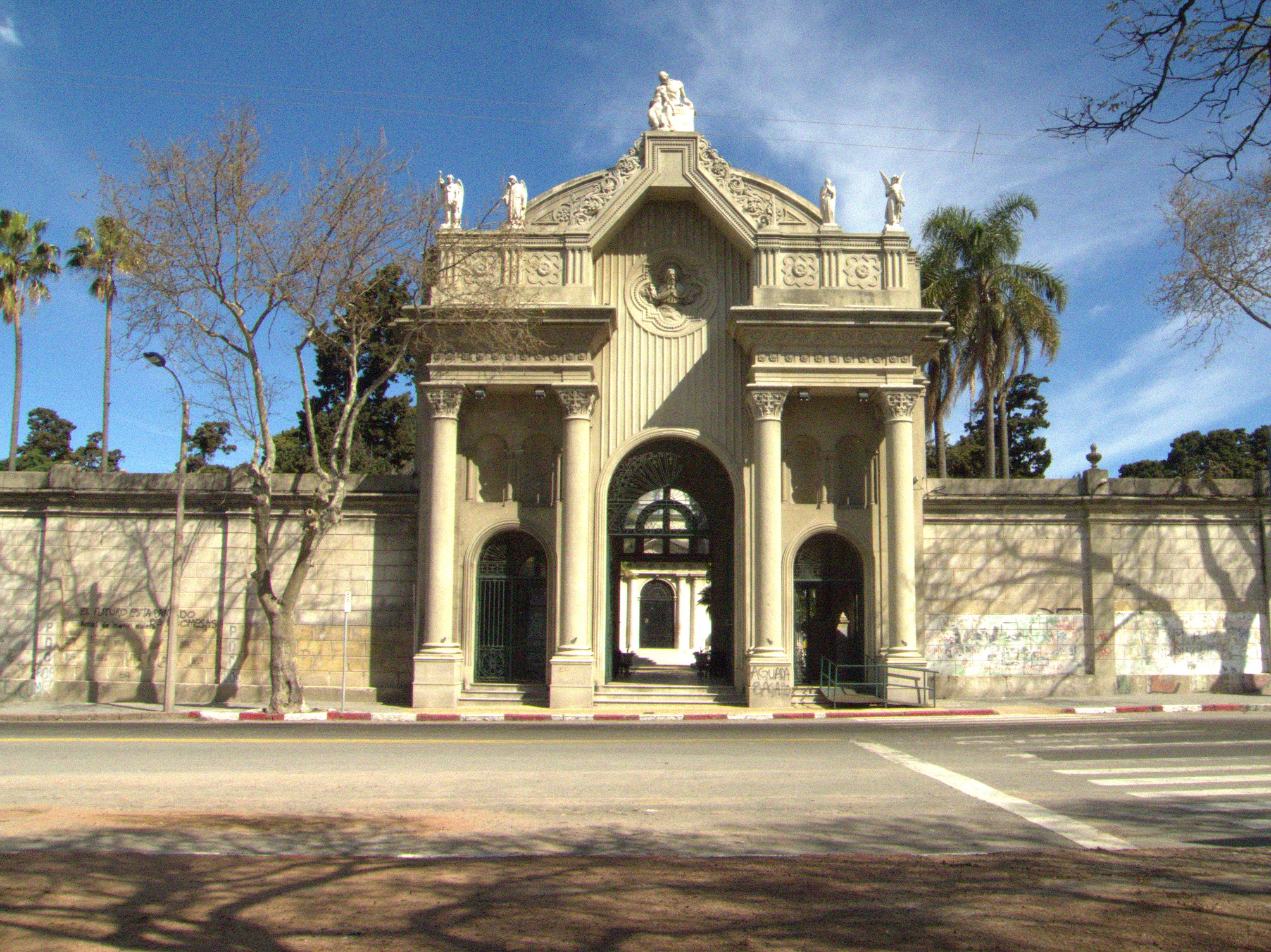 Cementerio Central - Rotonda del Cementerio. Ubicada en el departamento de Montevideo